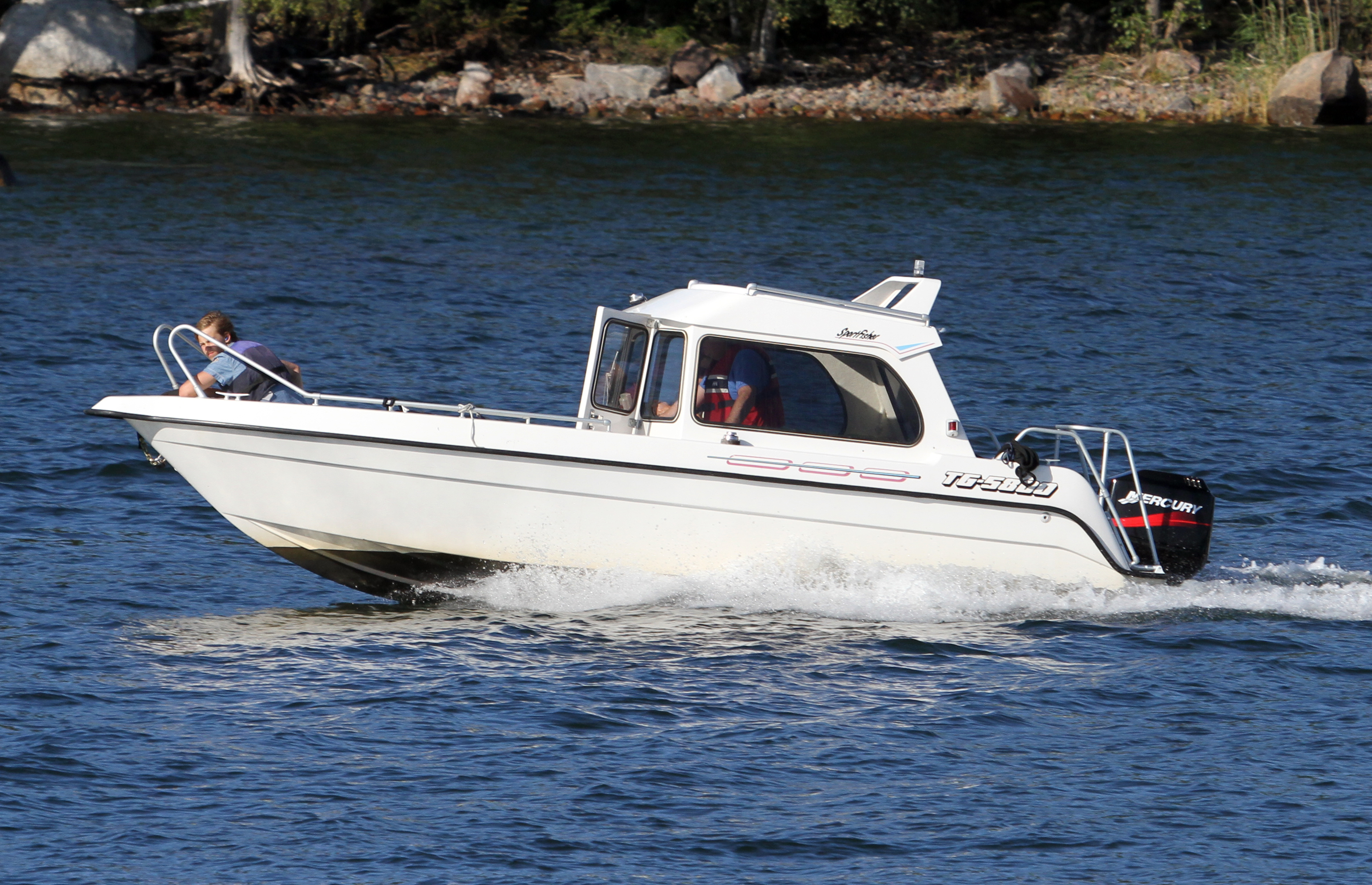 TG 5800 Sportfisher utanför Grinda, Värmdö 4 augusti 2015